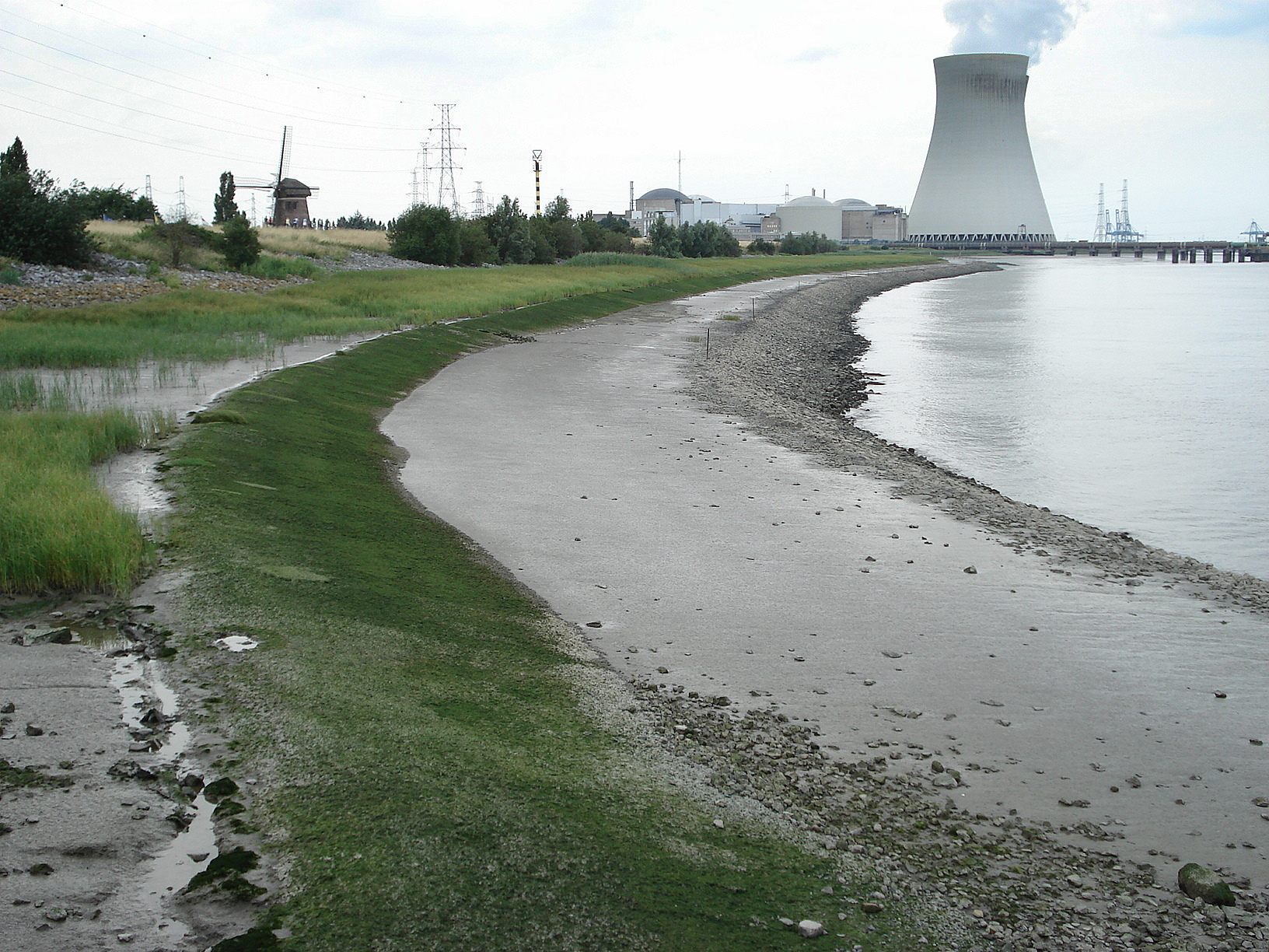 Doel (Belgique), berge de l'Escaut avec vieux moulin et centrale nucléaire. Doel: Scheldedijk met slikken. Oude molen en koeltorens kerncentrale. Vanop veer Doel-Lillo.